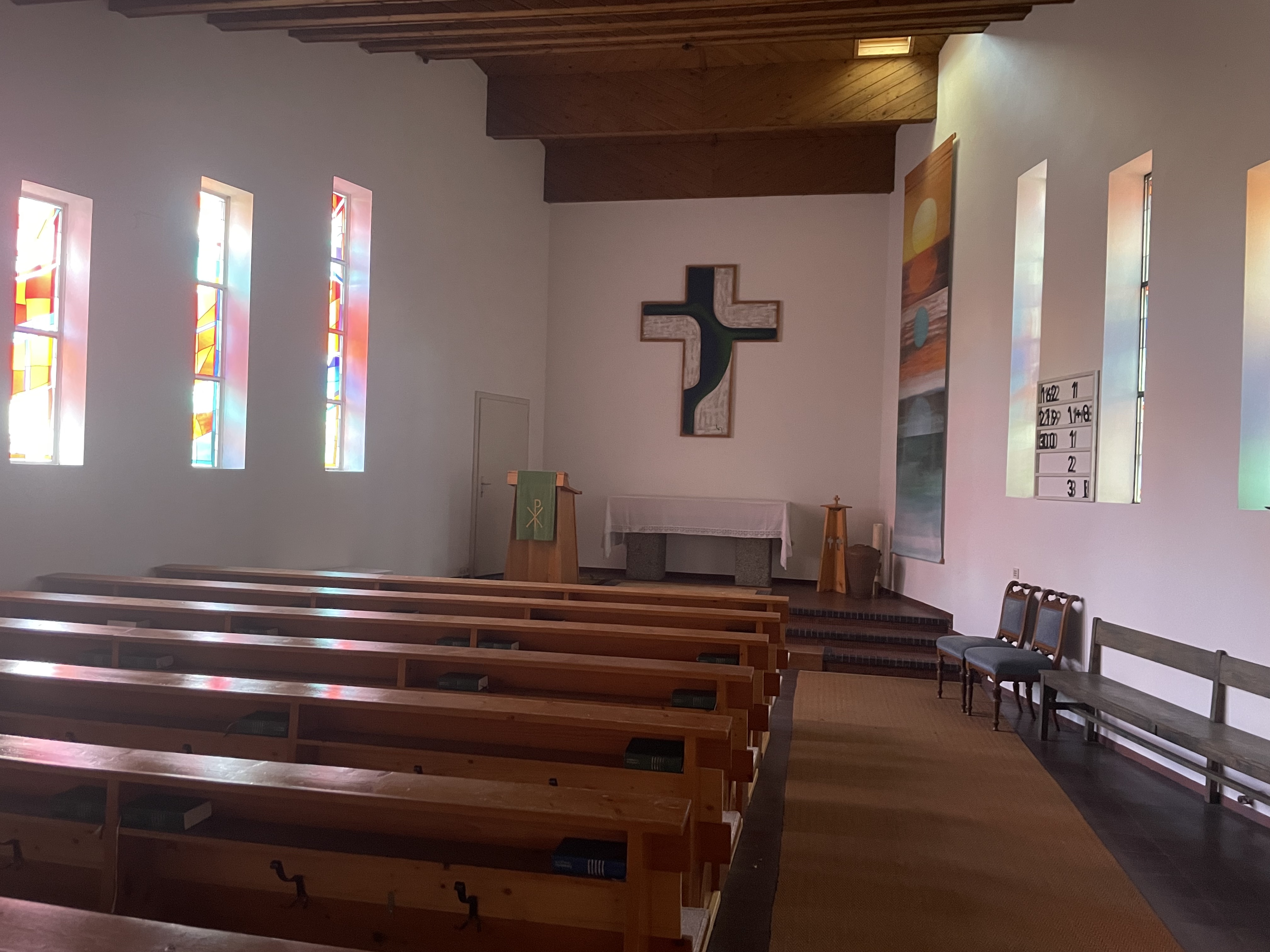 Innenansicht der Marienkirche Olten mit Blick auf den Chor und das Gehr-Gemälde